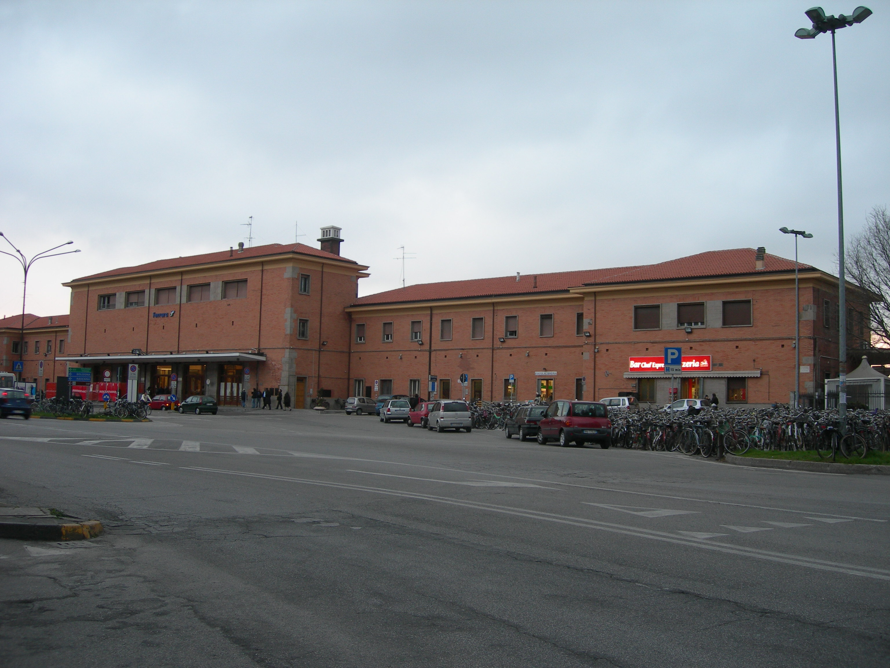 Stazione centrale a Ferrara